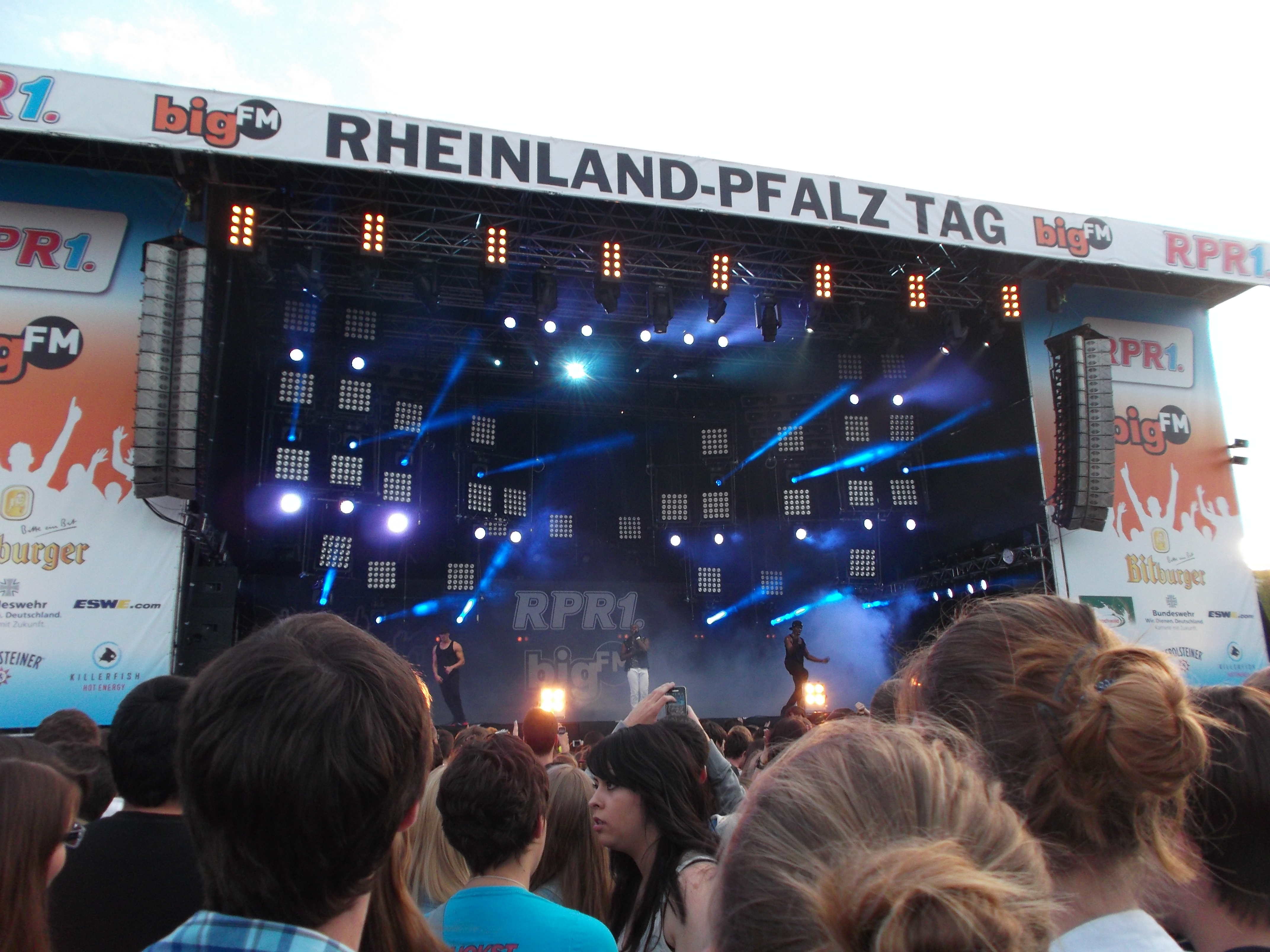 Rheinland-Pfalz-Tag 2013, Ingelheim